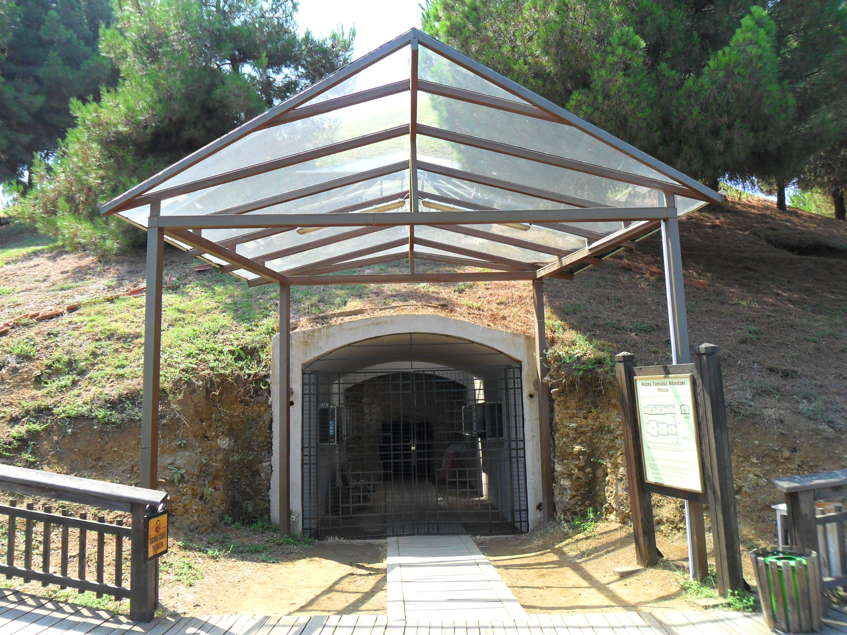 Amisos Tepesi'nde yer alan kuzey tümülüsü altındaki mezar girişi.